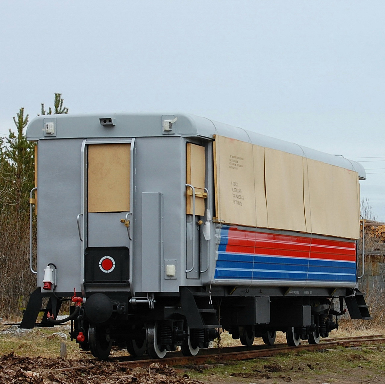 Кудемская УЖД